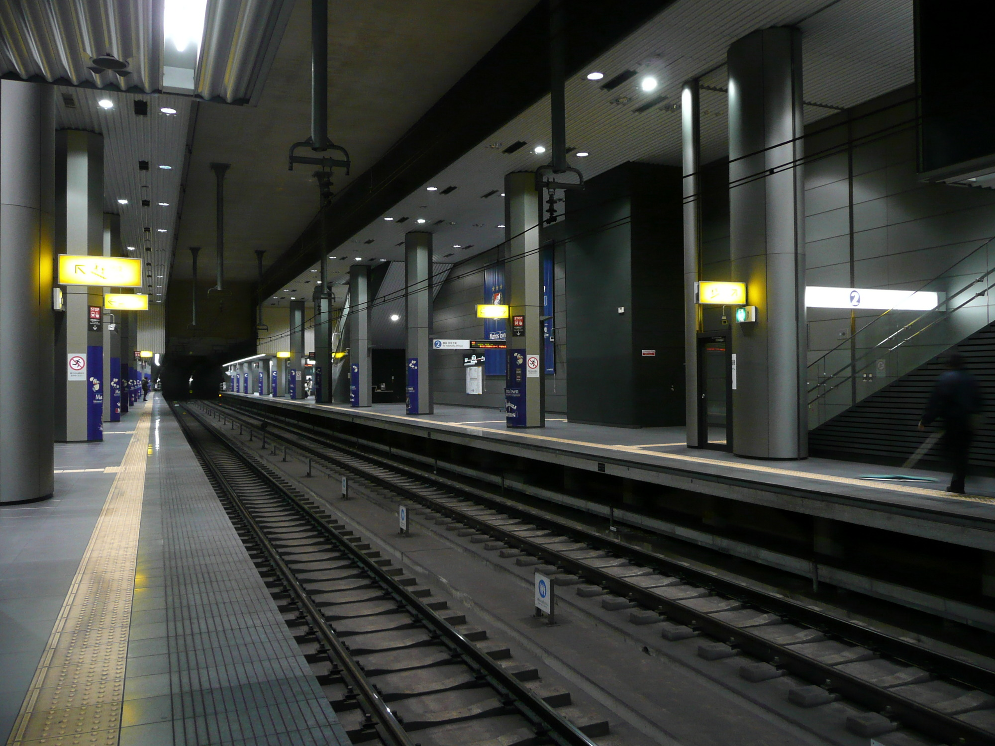 Yokohama Minatomirai Railway,Shin-takashima Station platform. / みなとみらい線新高島駅ホーム